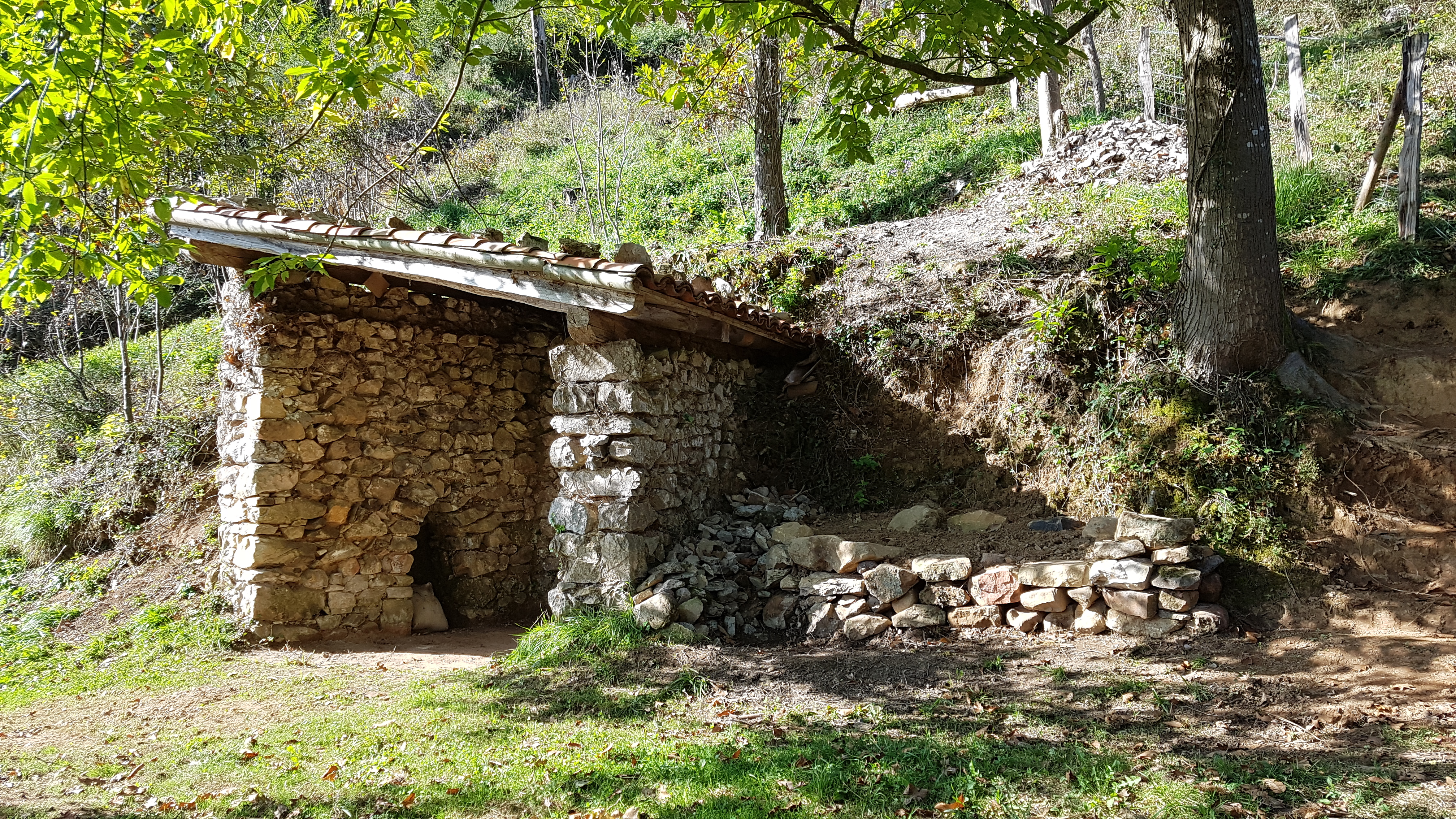 Irizibarko karobia, berrituta